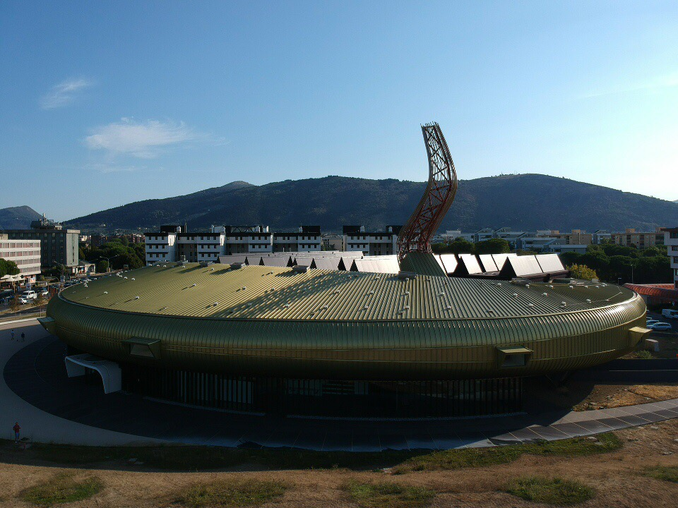 Foto fatta col drone del centro Pecci